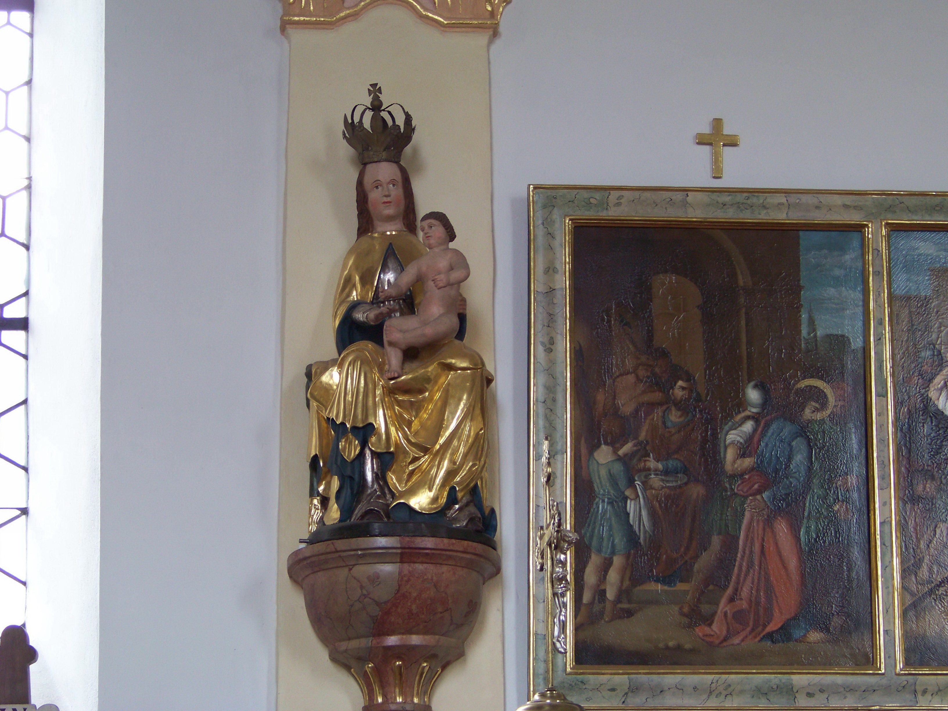 Langquaid Marktplatz 14. Katholische Pfarrkirche St. Jakob d. Ä. Saalkirche mit Steildach, eingezogenem Rechteckchor und Chorscheitelturm, Portalvorhalle nach Süden, Chor und Turm im Kern romanisch, 13. Jahrhundert, Langhaus spätgotisch, 15. Jahrhundert, Barockisierung der Anlage um 1740. Maria mit dem Kinde. Spätgotisch um 1430.